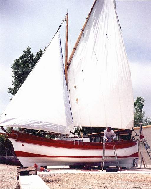 mourre de pouar: "réplique construite il y a une dizaine d'années d'après le bateau dessiné suivant les normes établies par Jules Vence dans son célèbre ouvrage de 1897 "Bateaux et embarcations à voile latine"."